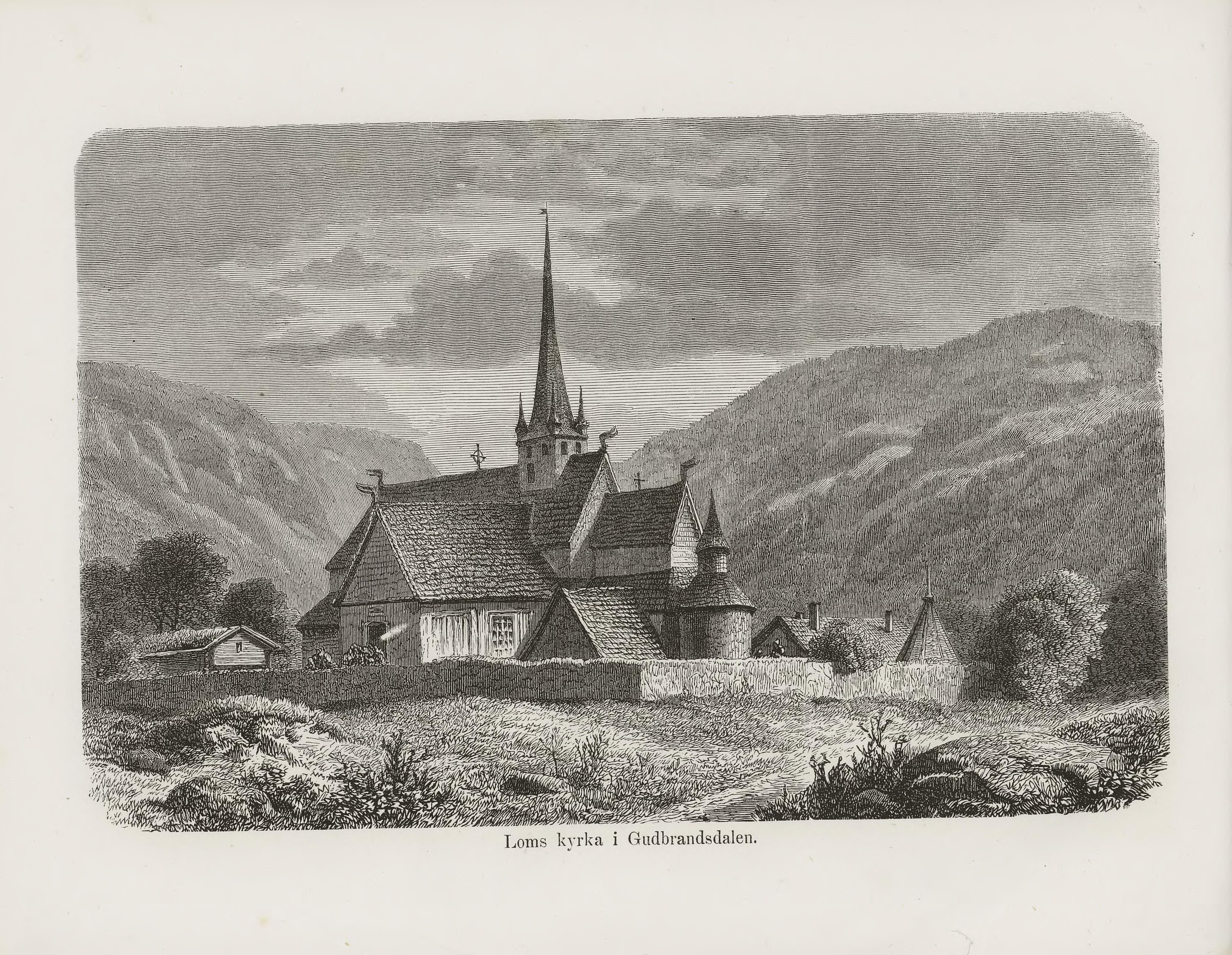 Illustrasjon hentet fra boken Nordiska taflor av ukjent forfatter og utgitt av Albert Bonnier (se, 1867)